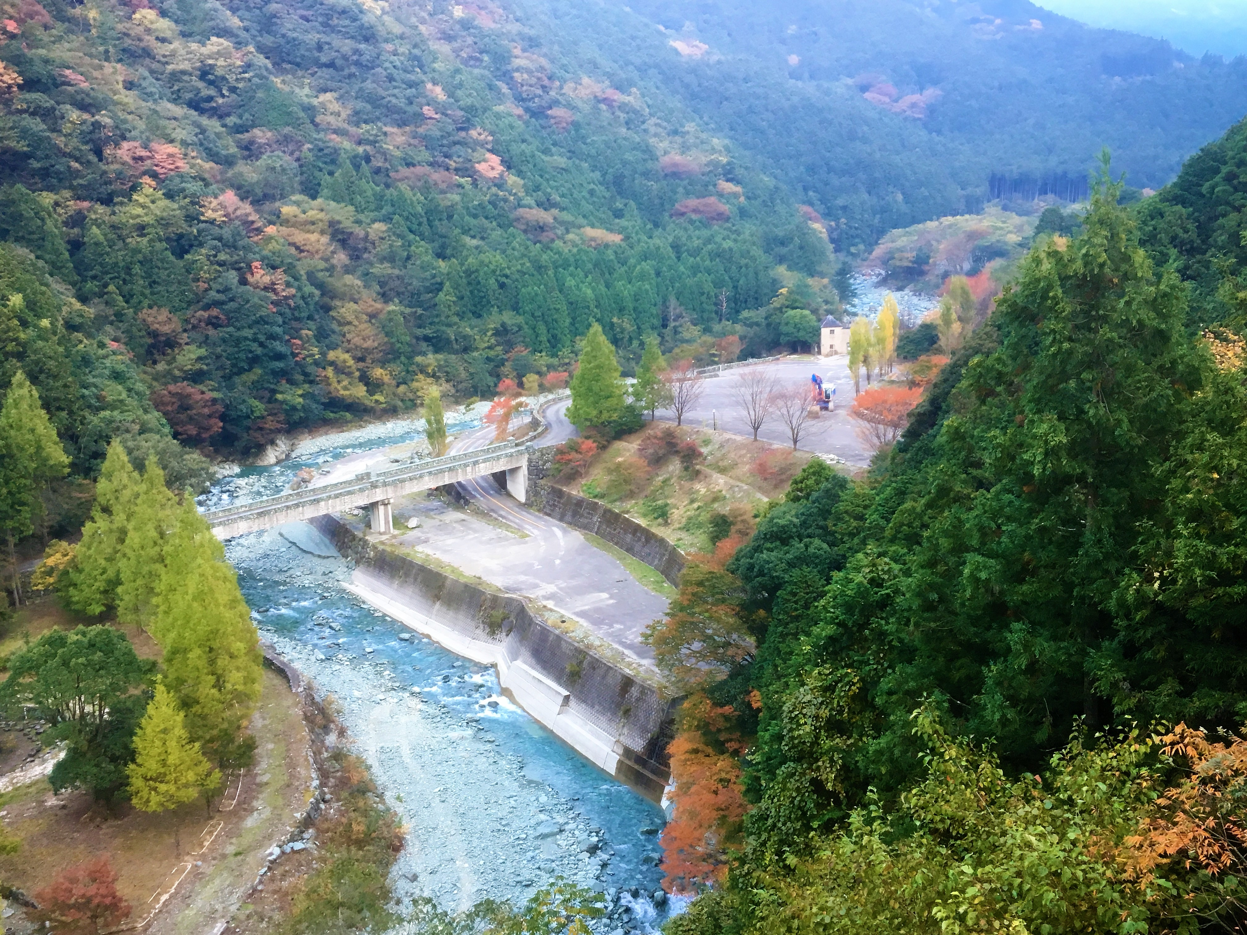 石鎚芸術村チロルの森の建造物